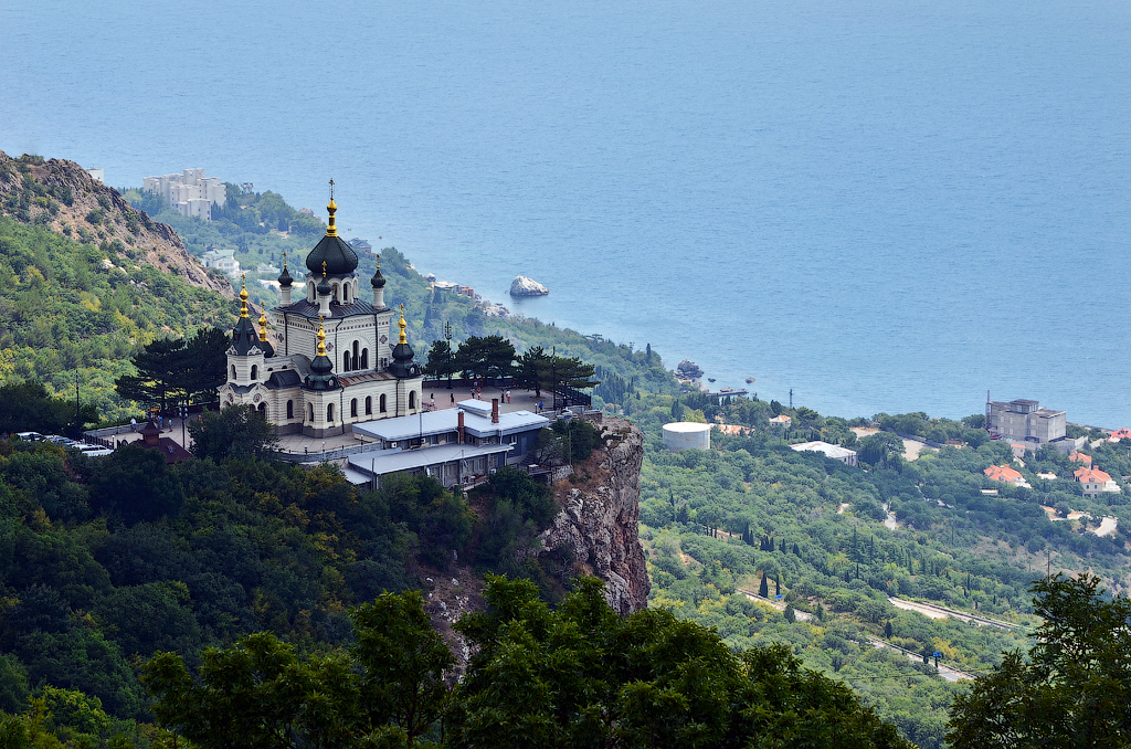 Церква Воскресіння Христового, Форос, с. Форос, поблизу перевалу Байдарські ворота